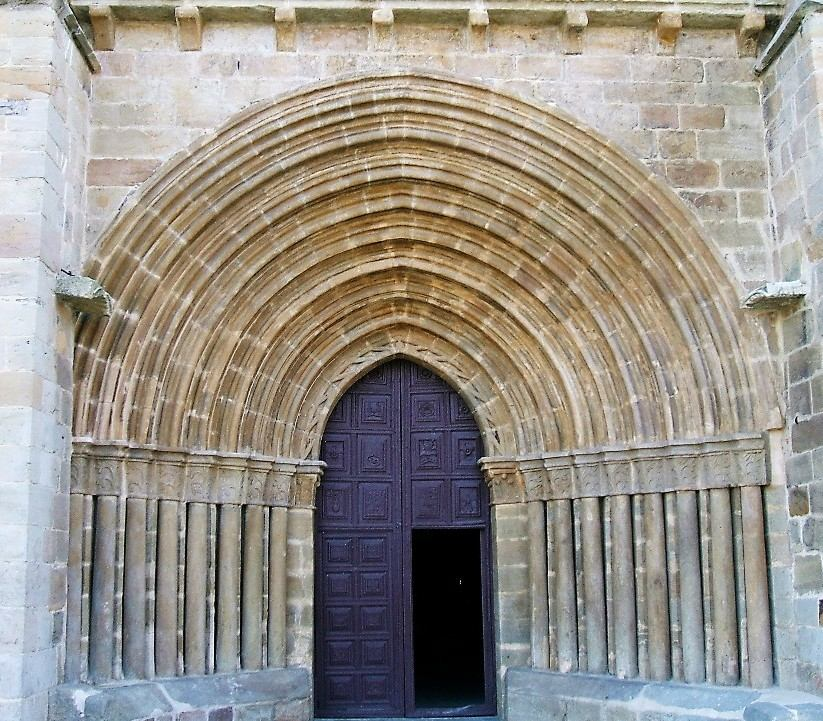 Portada tardorrománica (siglo XIII) de la Colegiata de San Miguel, Aguilar de Campoo, Palencia, España